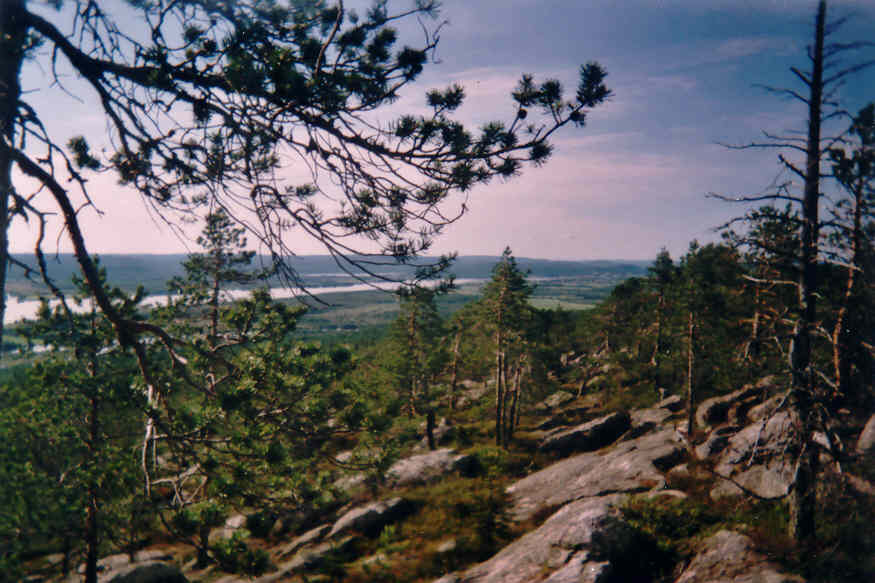 Tornedalen, vy över till Övertorneå från Ylitornio i juli 2004.